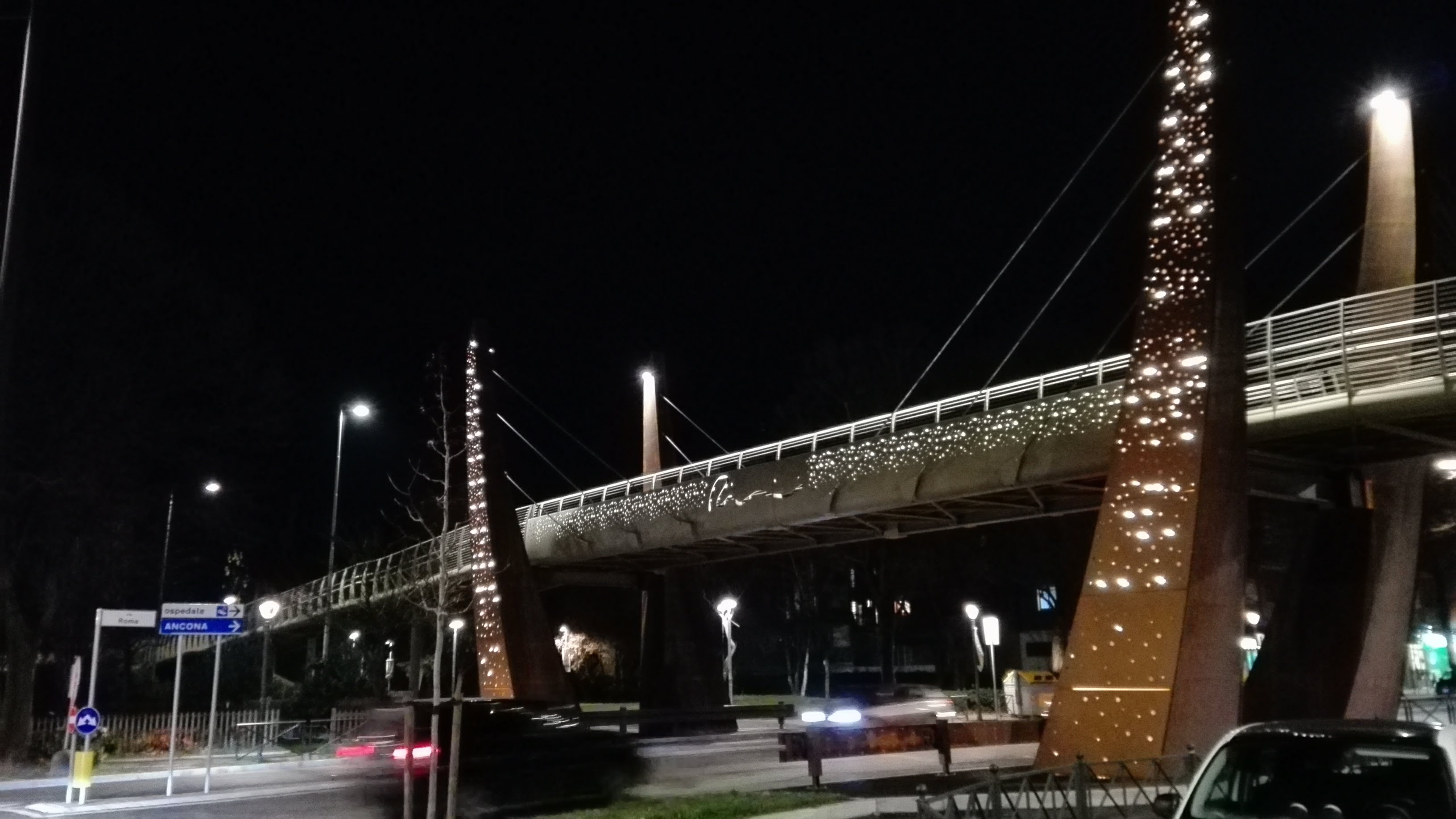 Questo ponte collega la pista ciclo-pedonale del Parco Cervi con quella del Parco Madre Elisabetta Renzi a Rimini